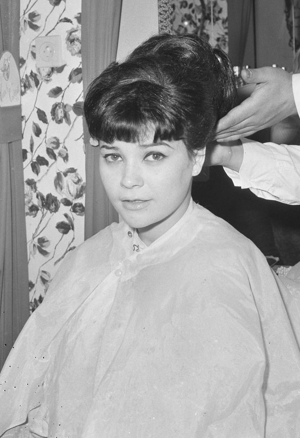 Zevende Europabeker voor Zangvoordracht te Knokke, Suzie bij de kapper